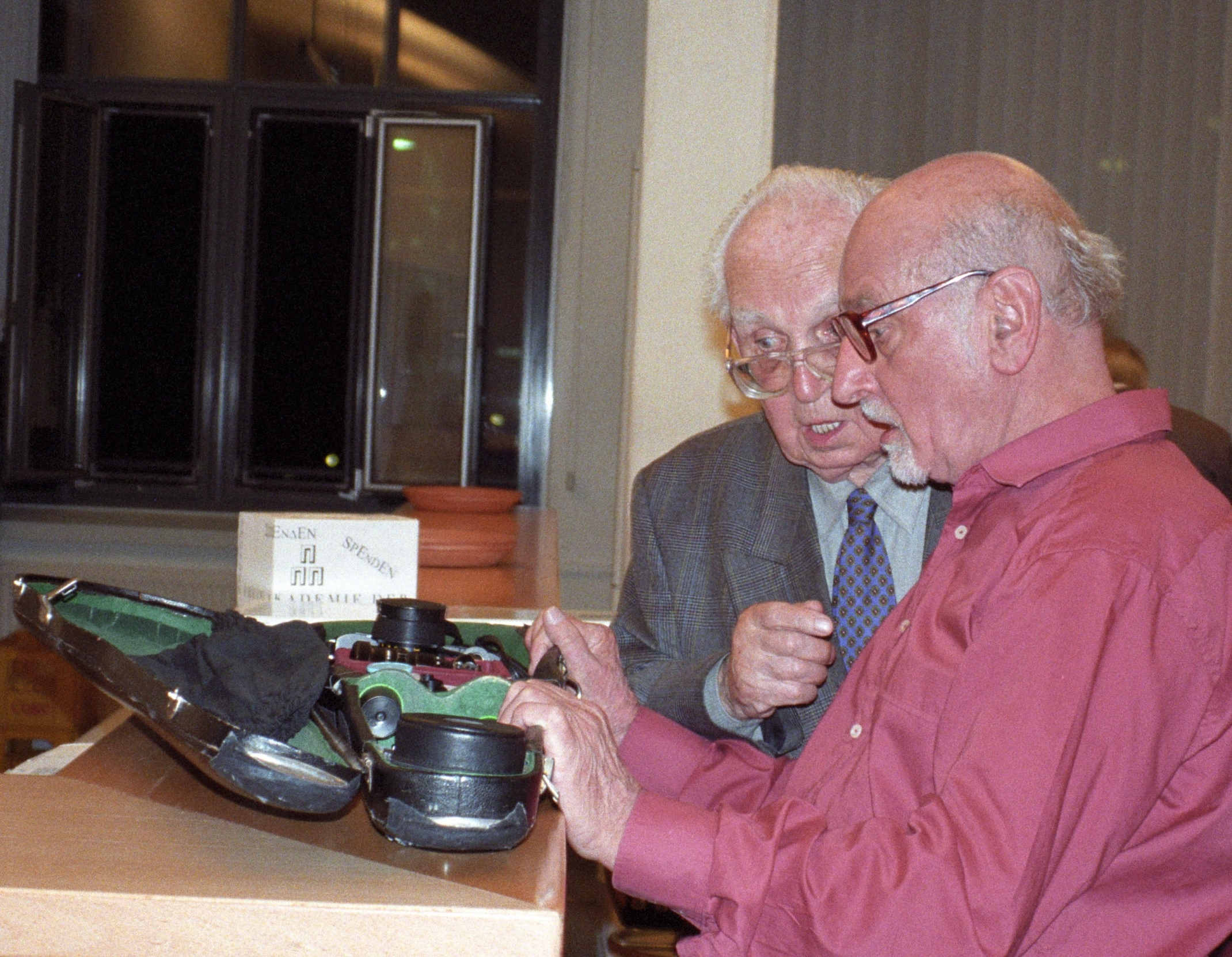 Fotograf Fritz Peyer erklärt einem Kollegen seinen Geigenkasten, den er zum Fotokoffer umfunktioniert hat